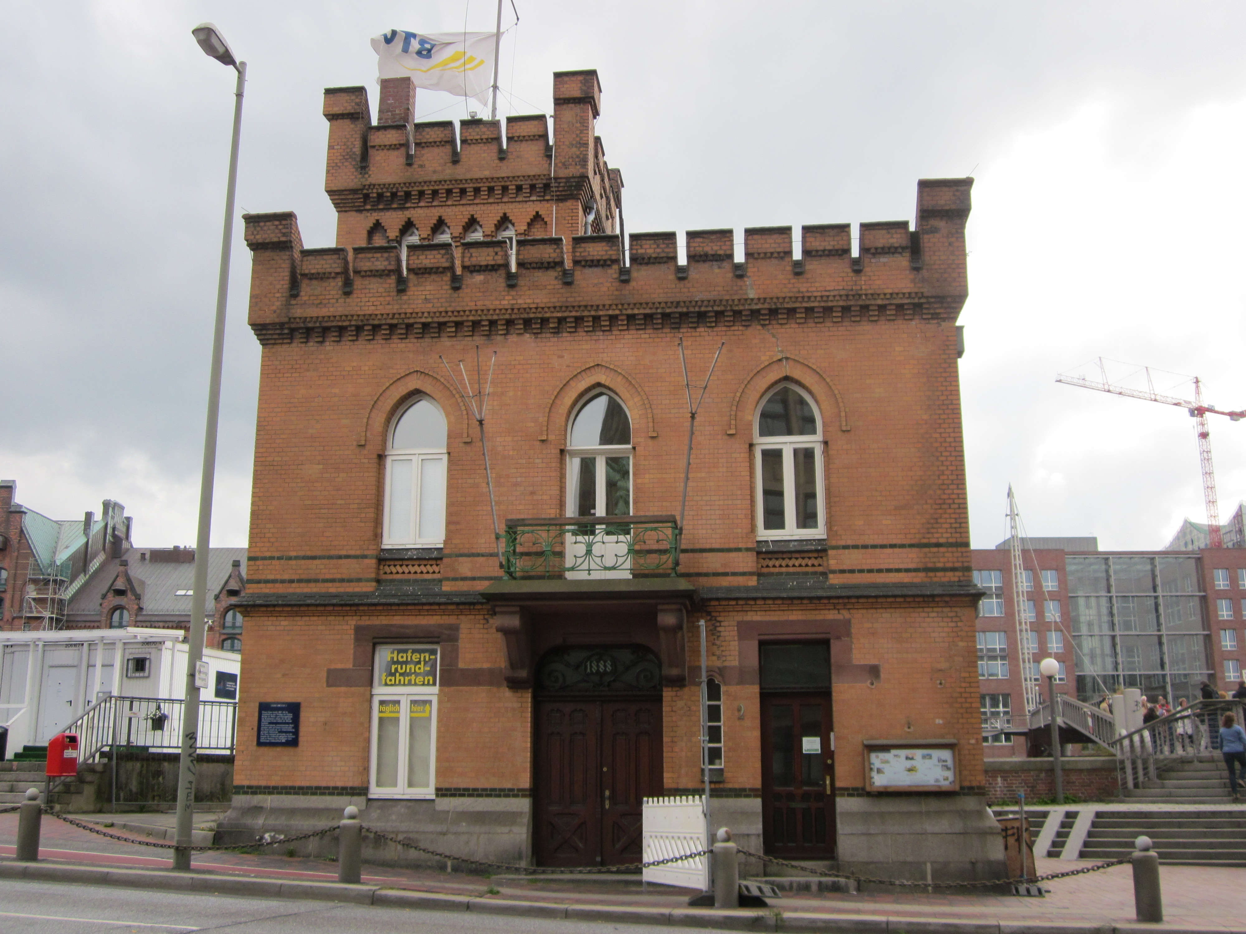 Im Haus Hohe Brücke 2 in der Hamburger Altstadt residierte früher der Kranwärter des Neuen Krans.